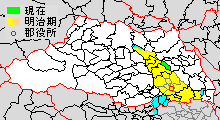 北足立郡の範囲 緑：現在の郡域、黄：明治期、青：隣接郡から編入された地域